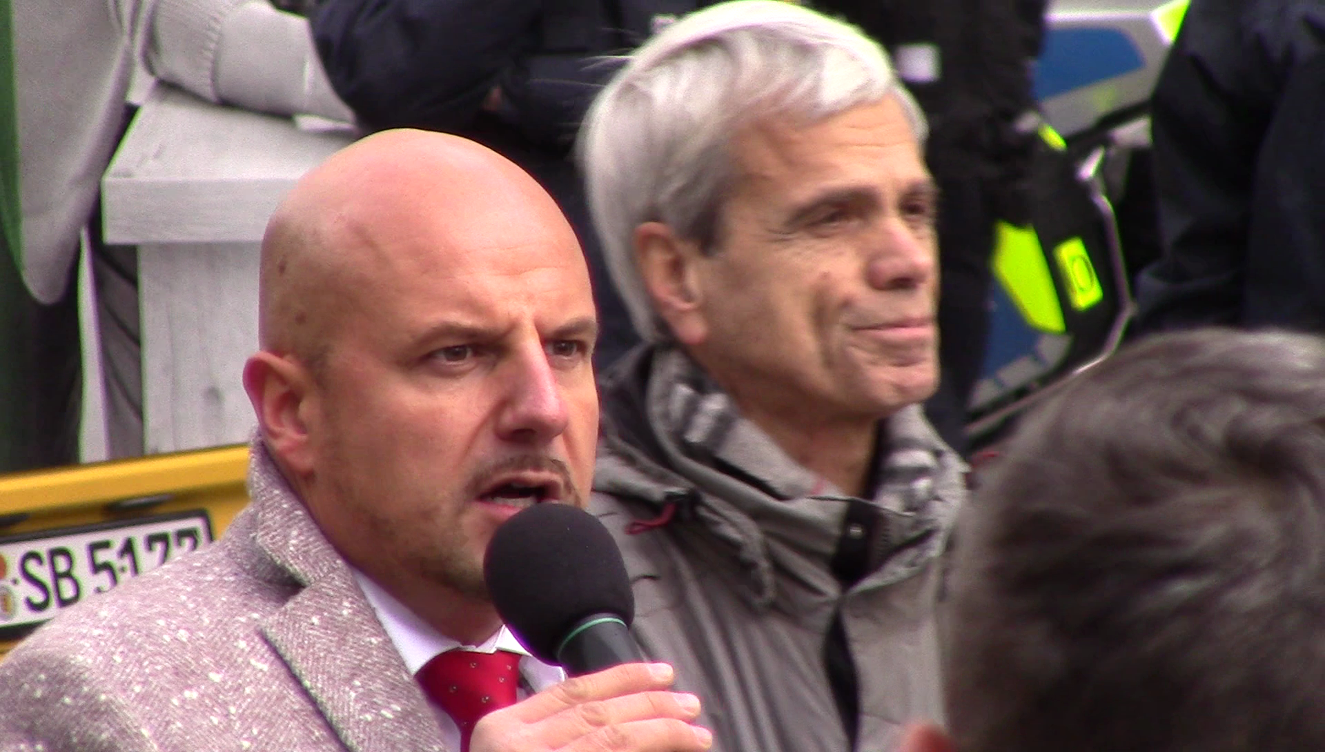 Stefan Räpple (links) und Wolfgang Gedeon bei der AfD-Demonstration gegen den UN-Migrationspakt am 08.12.2018